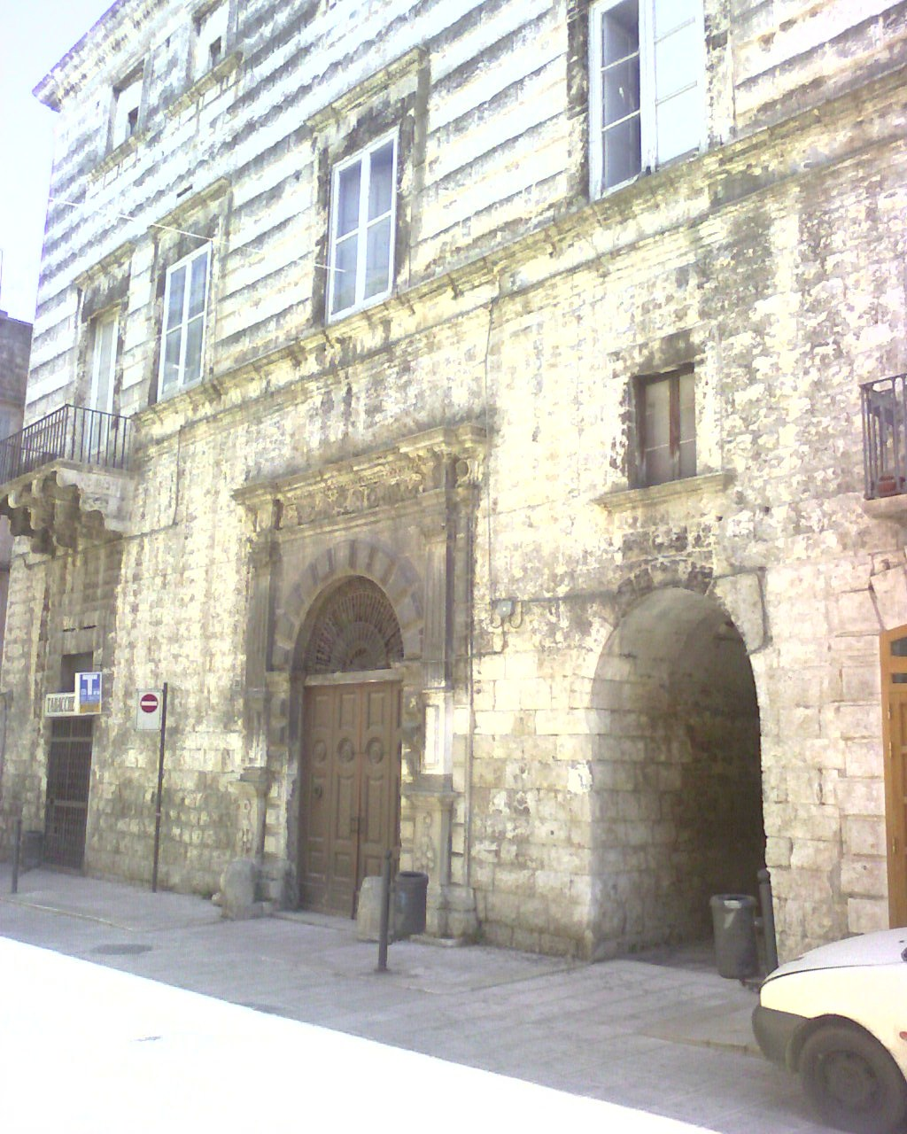 palazzo pascale-scarli - Modugno (bari)-Italy